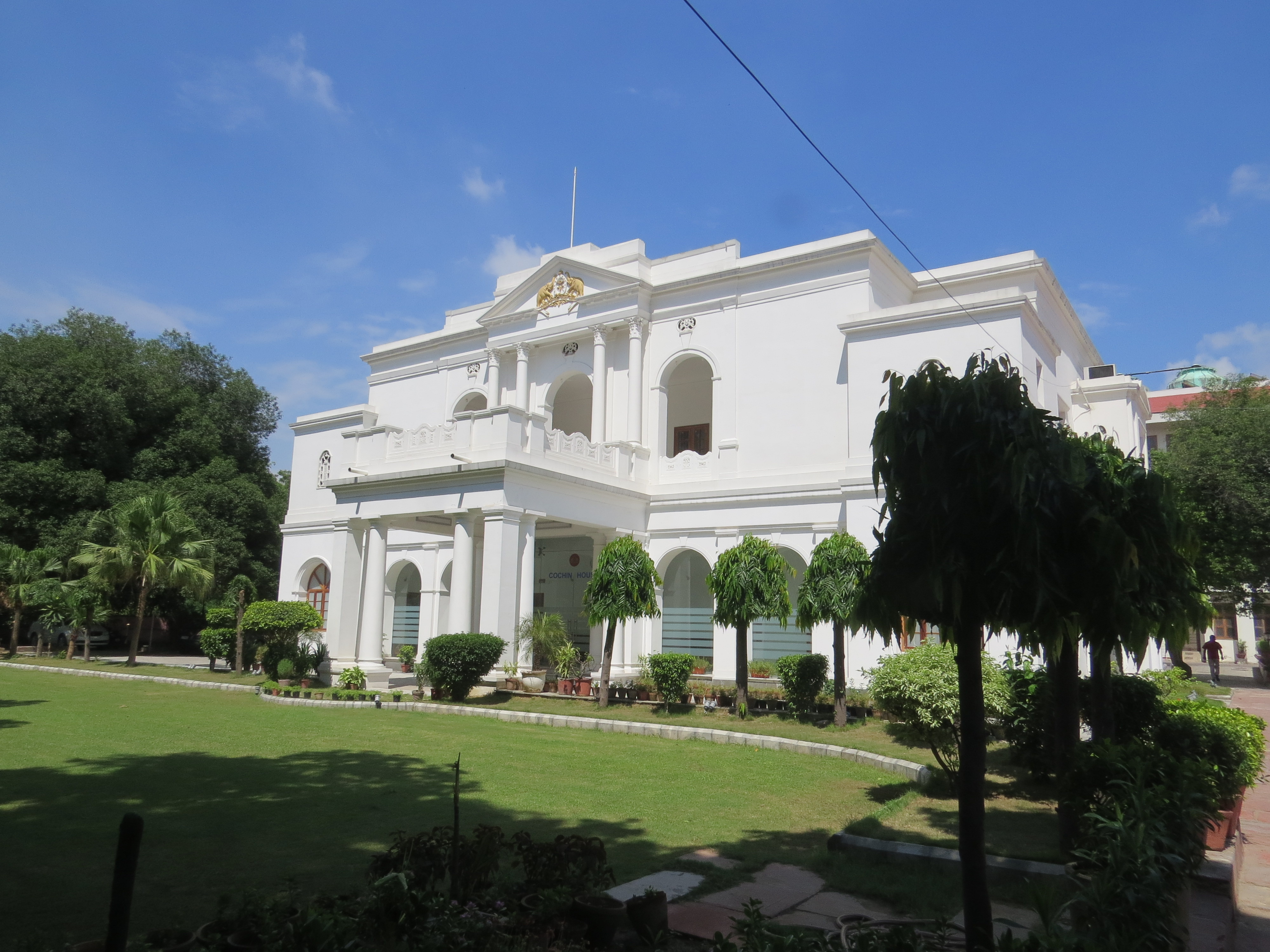 Photos taken during WCI, Chandigarh 2016